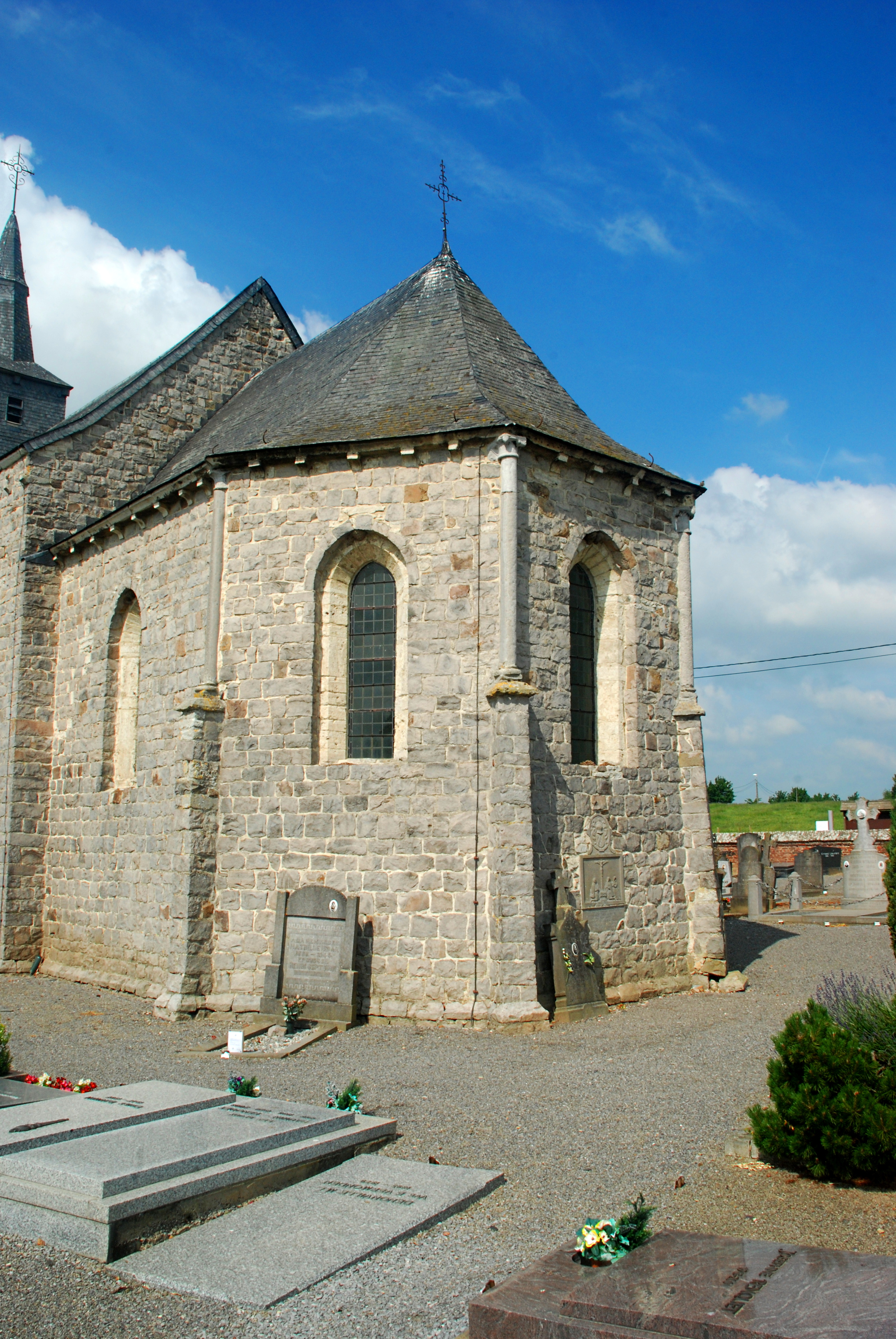 Belgique - Brabant wallon - Jodoigne - Piétrain - Chapelle Sainte-Catherine d'Herbais